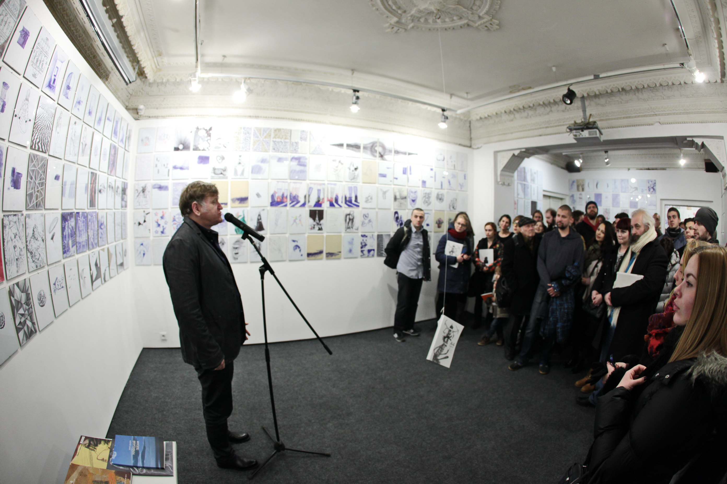 Евгений Карась на открытии 10-й юбилейной выставки проэкта "А4, Шариковая ручка"